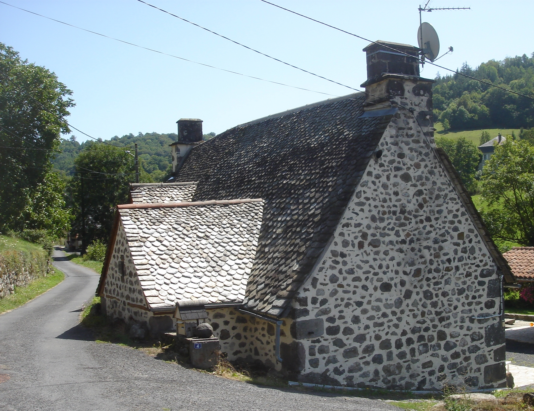 Maison Reilhaguet. Reilhac (15) France. Couverture en lauzes.